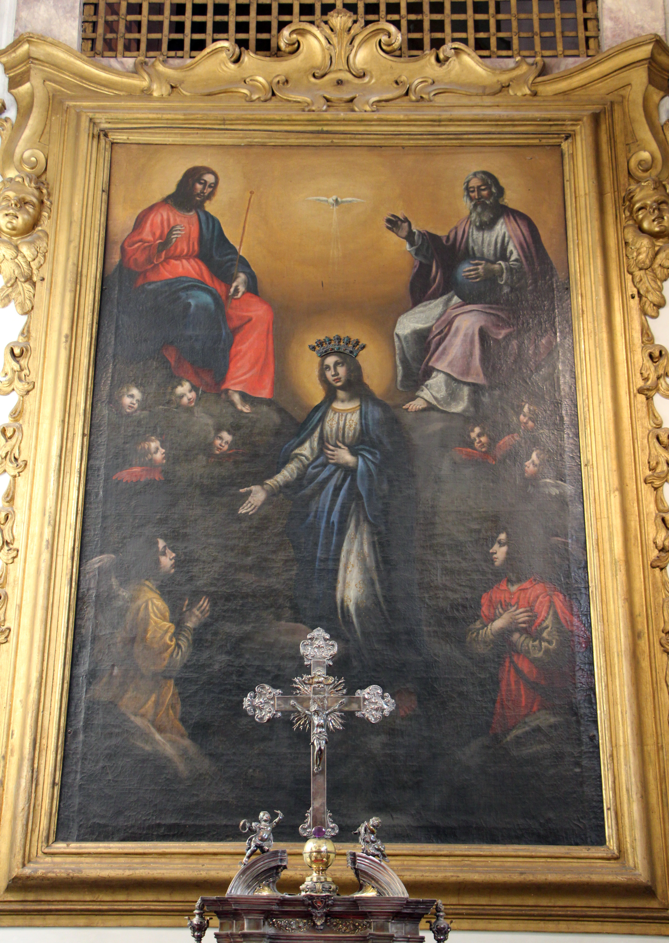 Villa La Quiete, Firenze